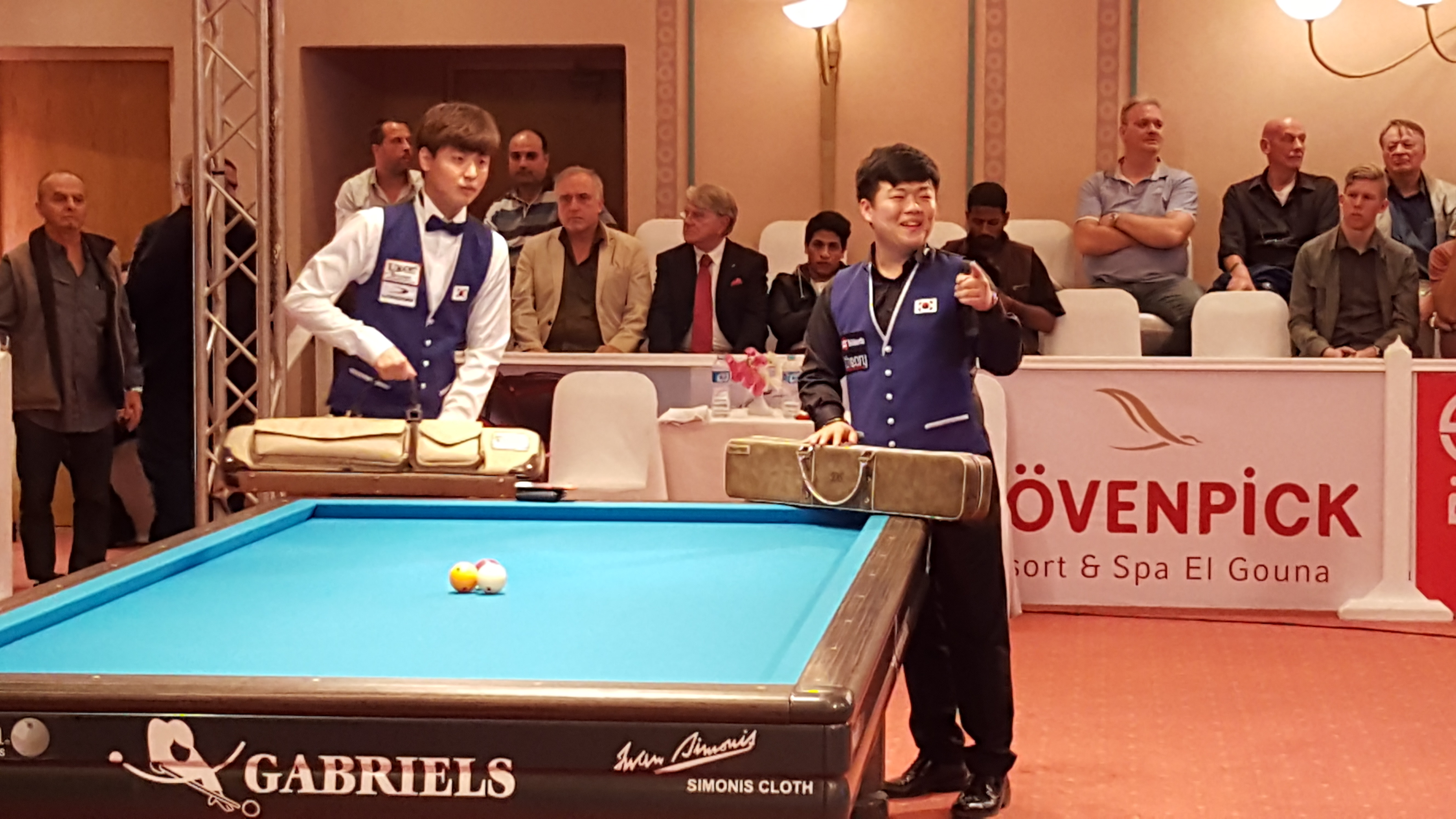 Dreiband-Weltmeisterschaft der Junioren 2016 in el-Guna, Ägypten. Die Finalteilnehmer Shin Jung-ju (KOR) & Cho Myung-woo (KOR) bei der Spielvorbereitung.